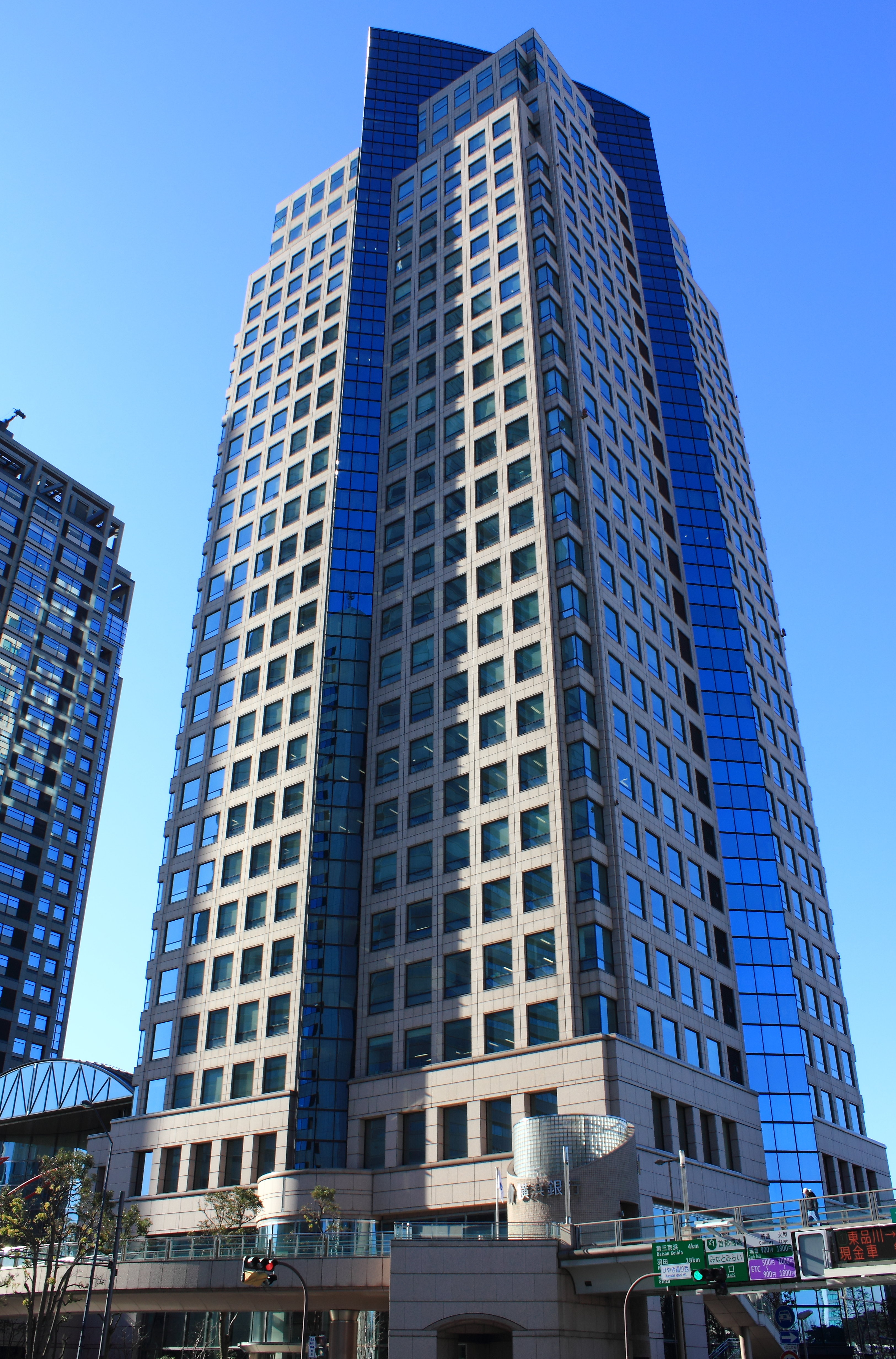 横浜銀行本店